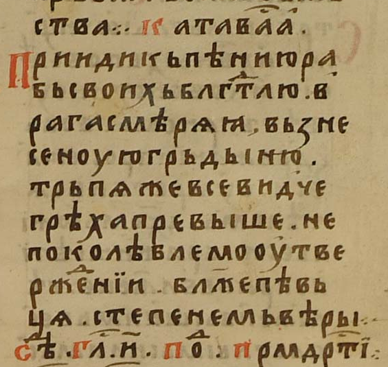 Катавасия, 3 песнь, глас 1 (ирмос второго канона Рождества Христова). Служба 4 декабря, память Саввы Освященного. Рукопись № 32. (1998). Минея служебная. Месяц декабрь, полуустав, в два столбца, исход ХV века. Библиотека Троицко-Сергиевой лавры.